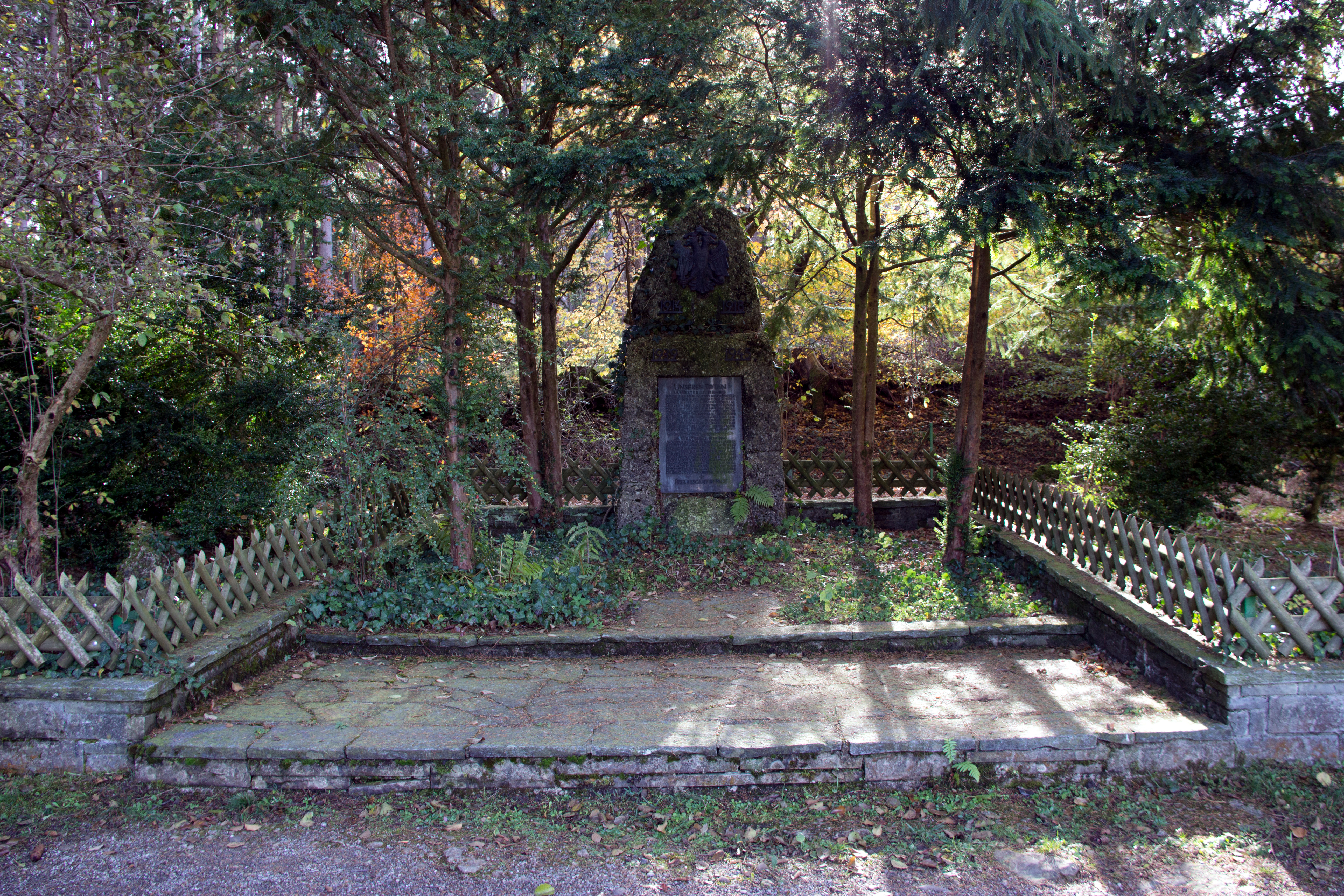 1937 eingeweihtes Österreicher-Denkmal in Kempten